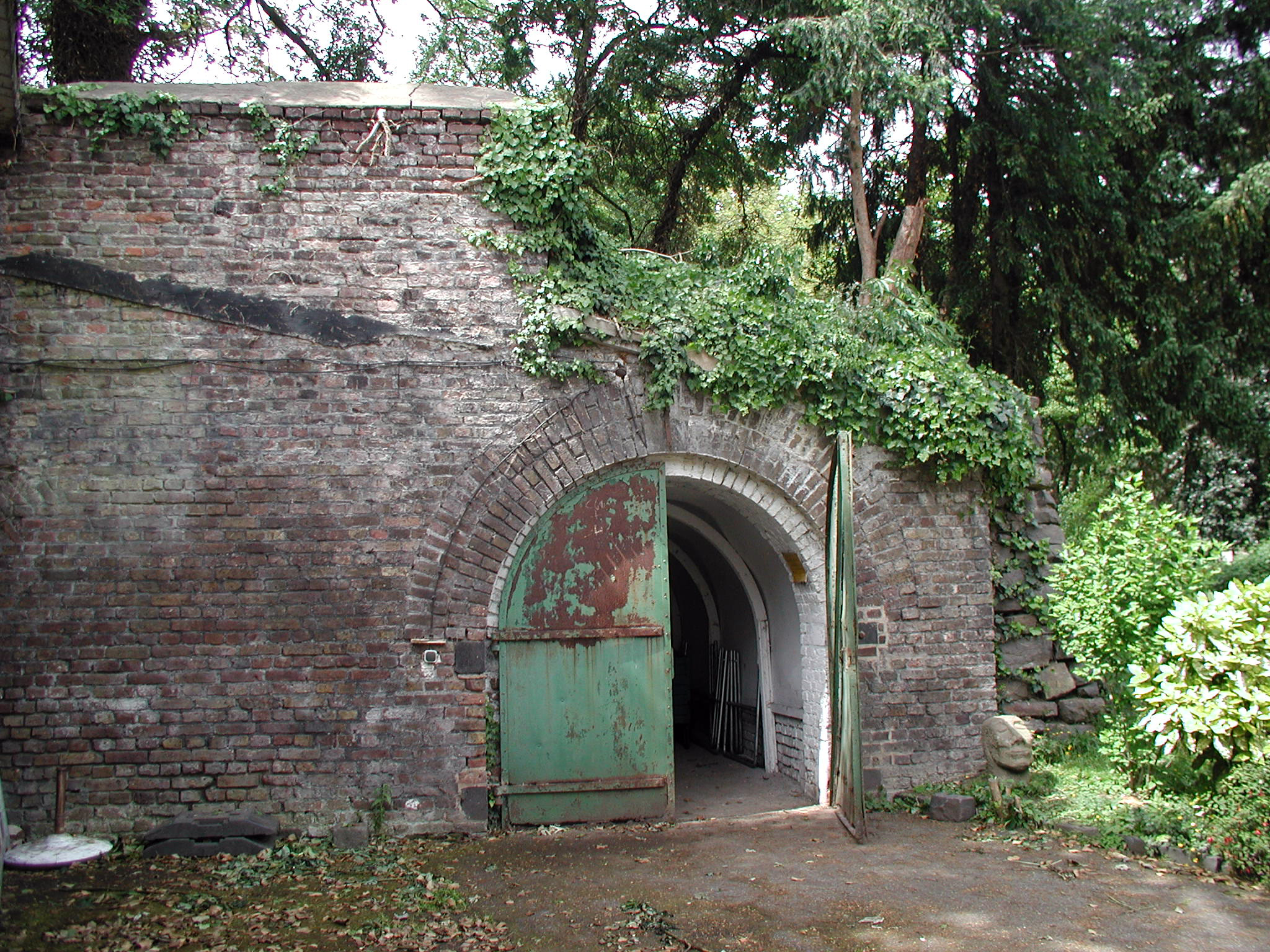 Festungsring-Köln, Fort IV Volksgarten